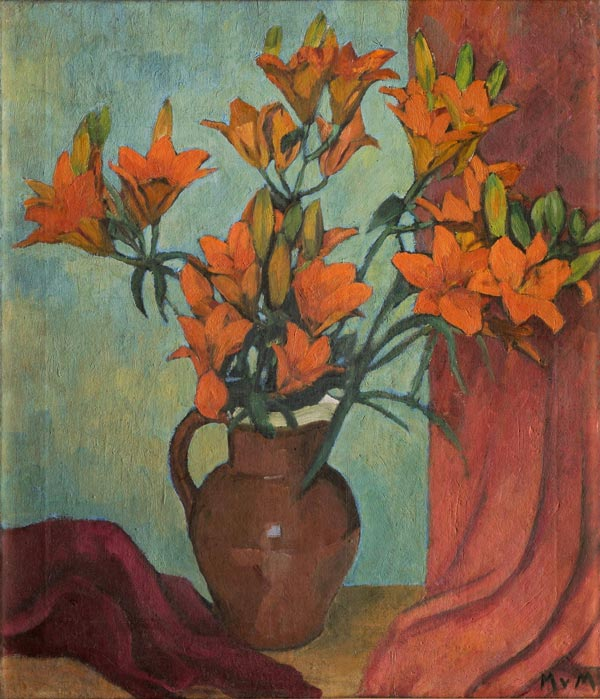 Feuerlilien (Verso: Weg im Park), um 1912. Öl auf Leinwand, 73 × 61 cm; August Macke Haus Bonn